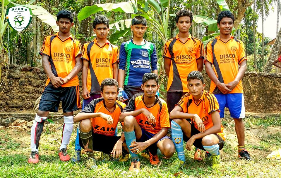 FOOTBALL TEAM